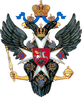 Элемент полного герба Российской империи времён Павла I. 1800